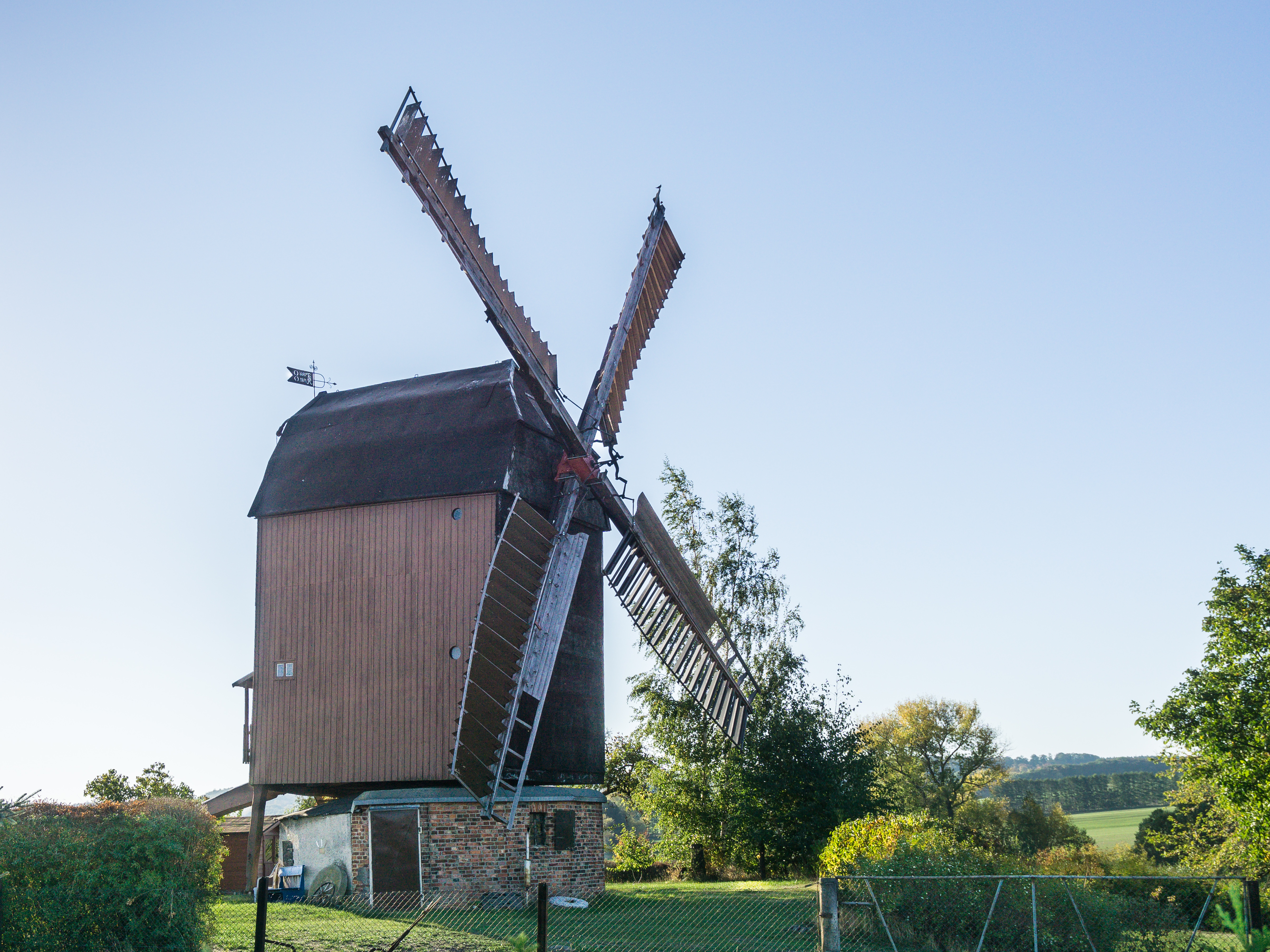 Bockwindmühle, Schmalbachstraße in Huy OT Badersleben